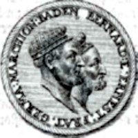 Kupferstich der fürstlich badischen Eintrachtsmedaille von 1533 mit Markgraf Bernhard III. von Baden-Baden im Vordergrund und Ernst I. von Baden-Durlach im Hintergrund